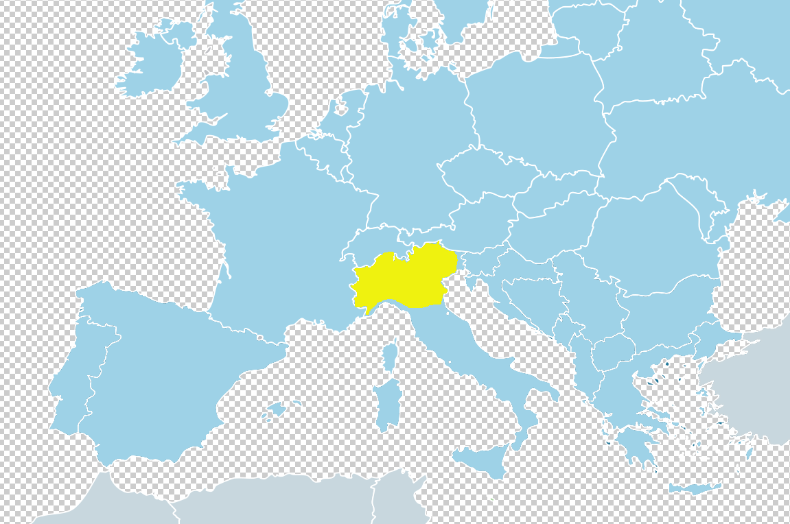 Mappa Distribuzione